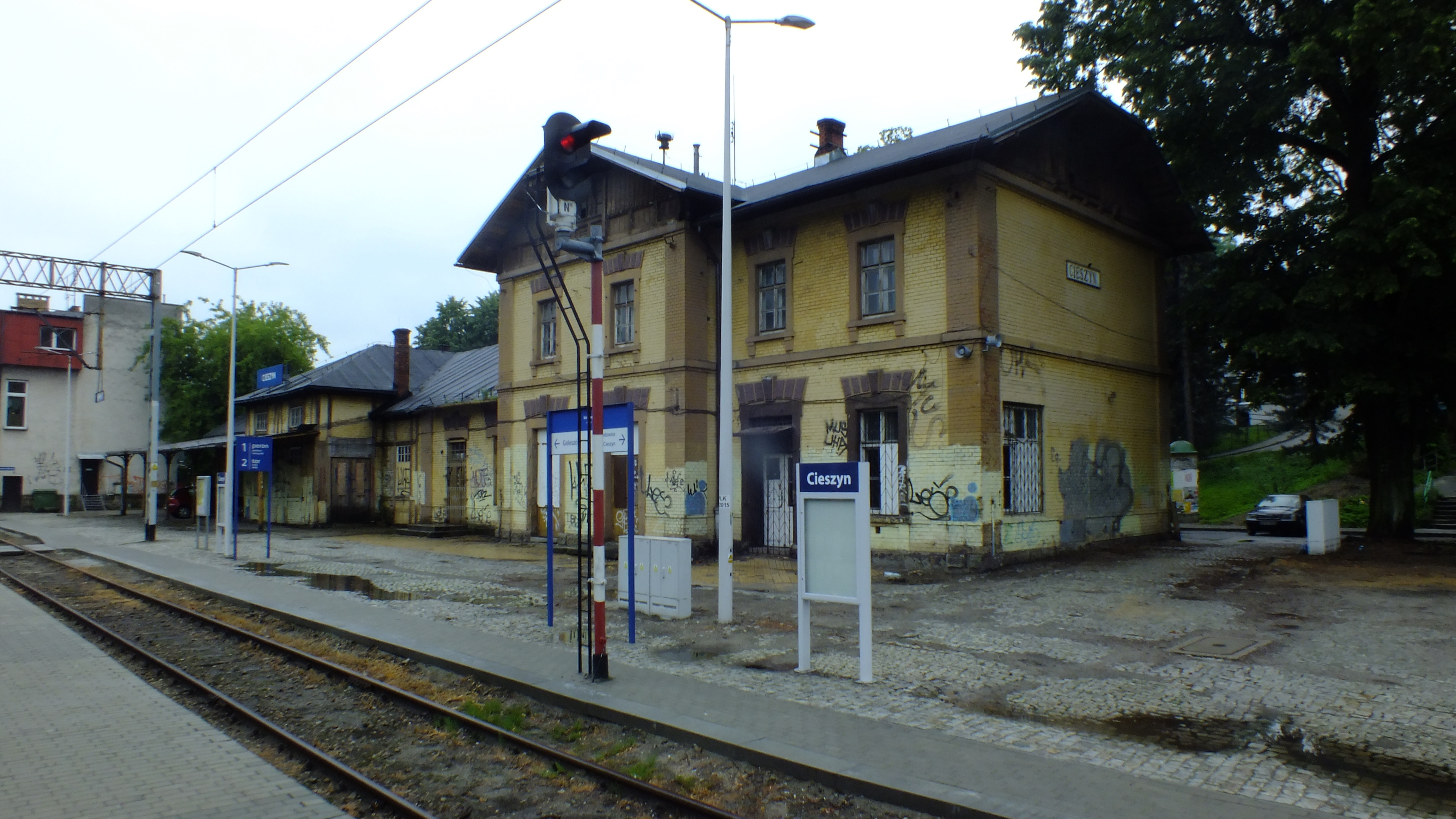 Stacja kolejowa w Cieszynie.